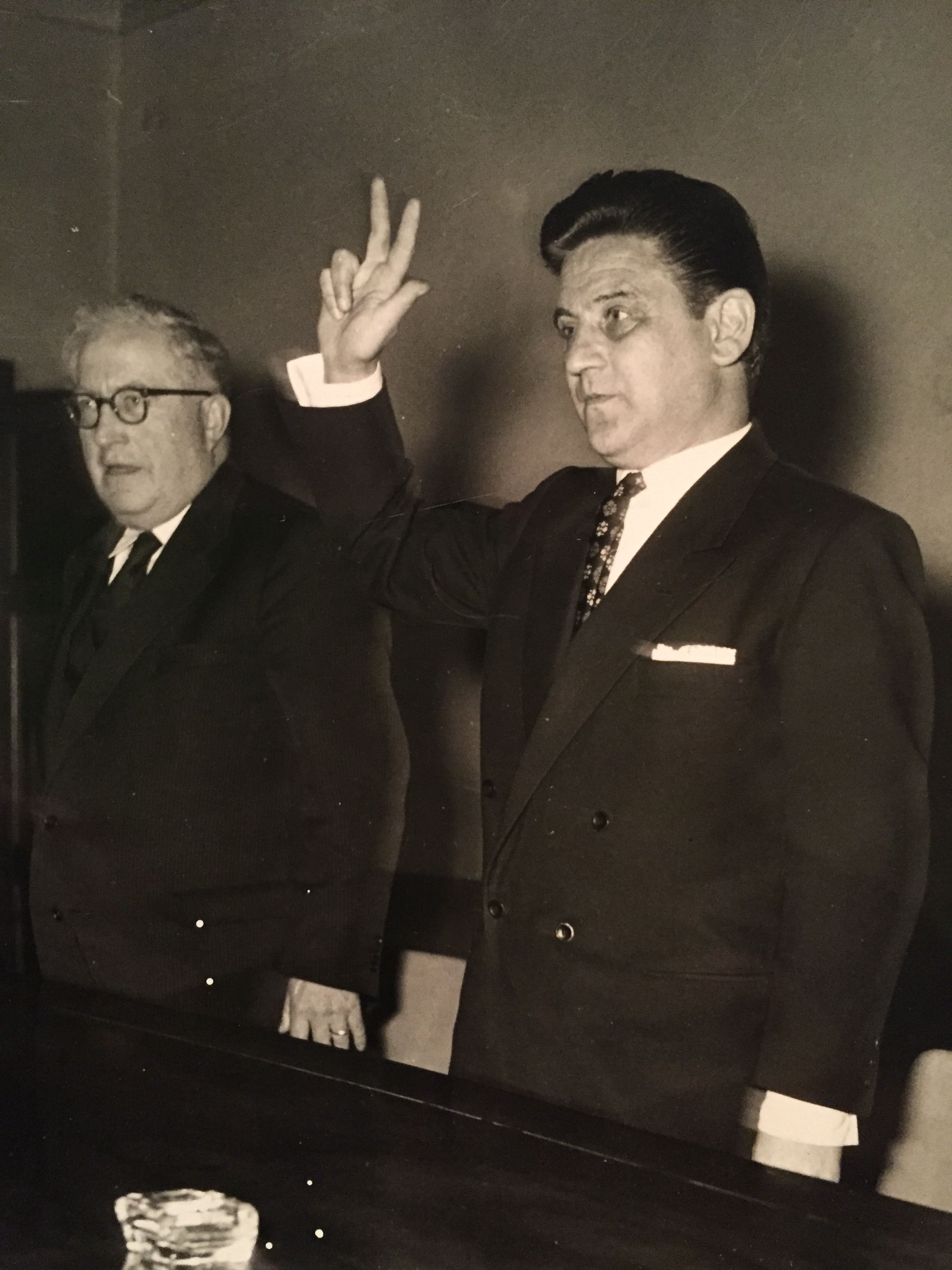 giuramento per il consiglio di Stato